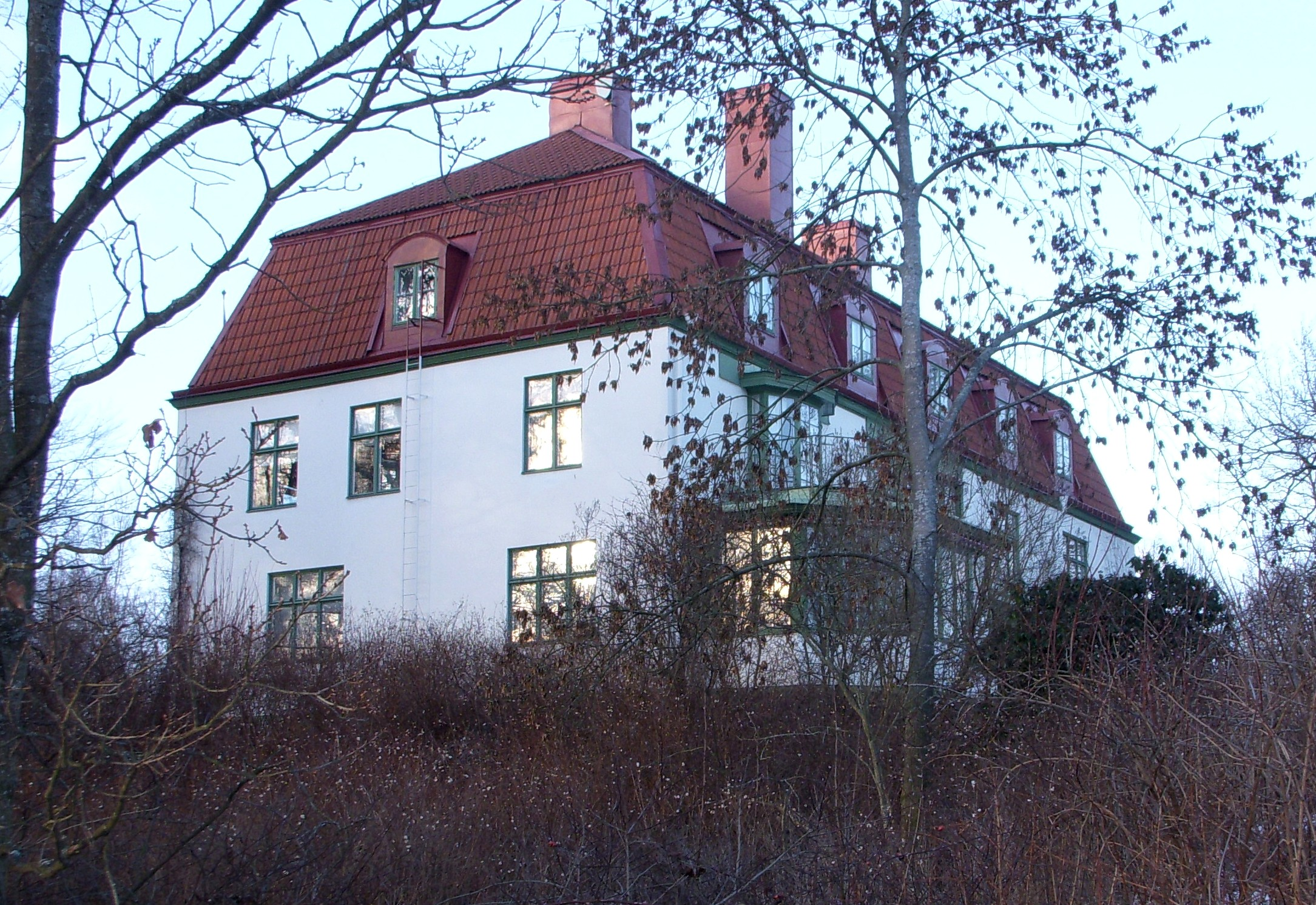 Villa Parkudden auf Djurgården, Stockholm